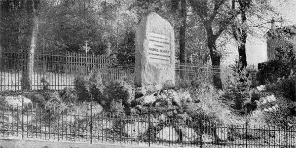 Monumento espiatorio à Miguel Servet, Genéve, photo du 1911